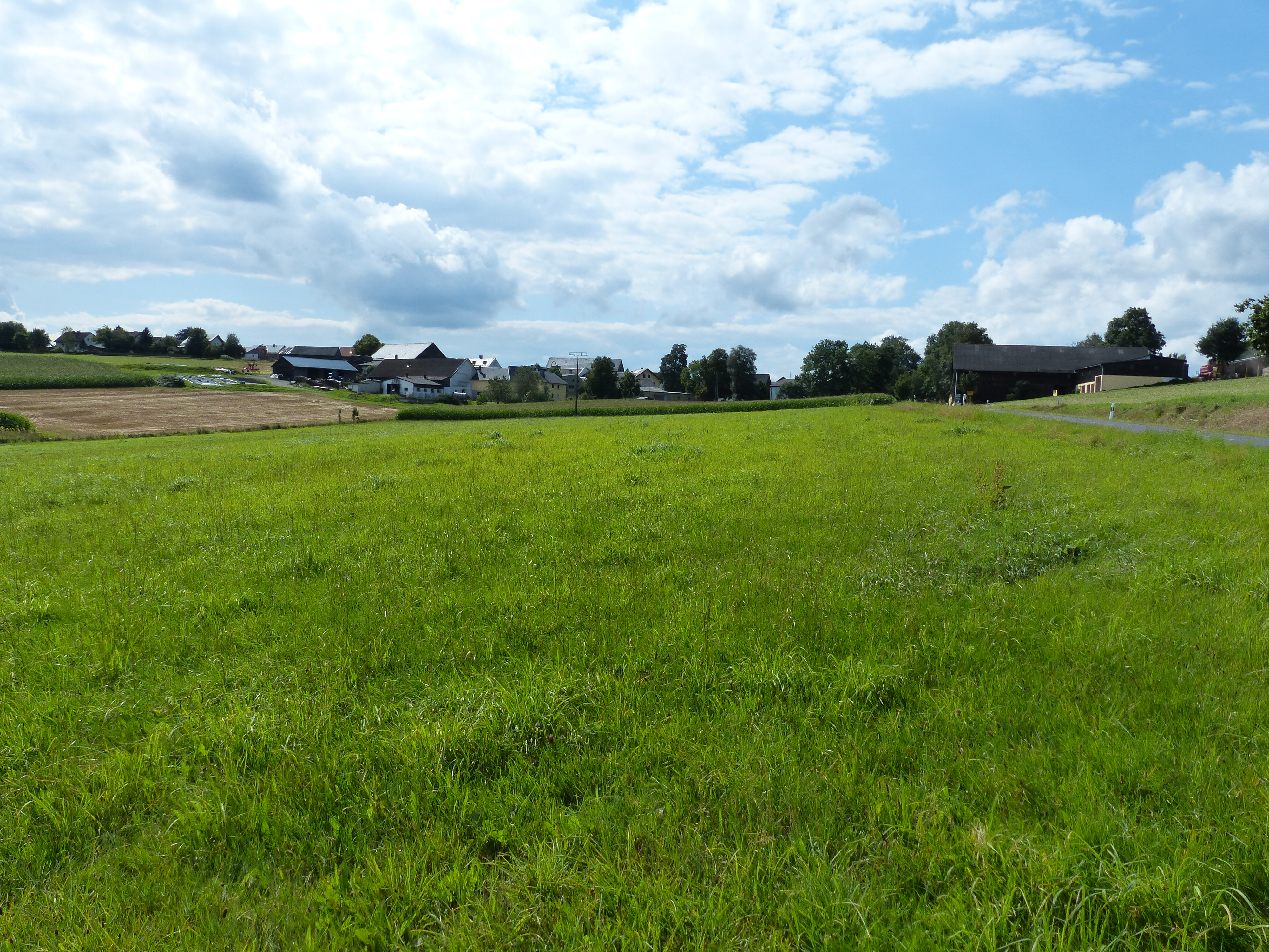 Ansicht von Oberpferdt, Ortsteil von Konradsreuth